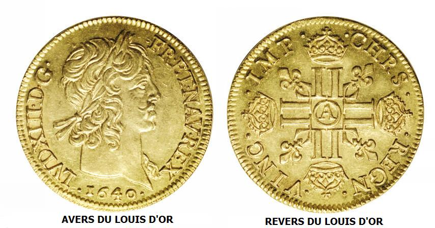 Photo de ma collection personnelle